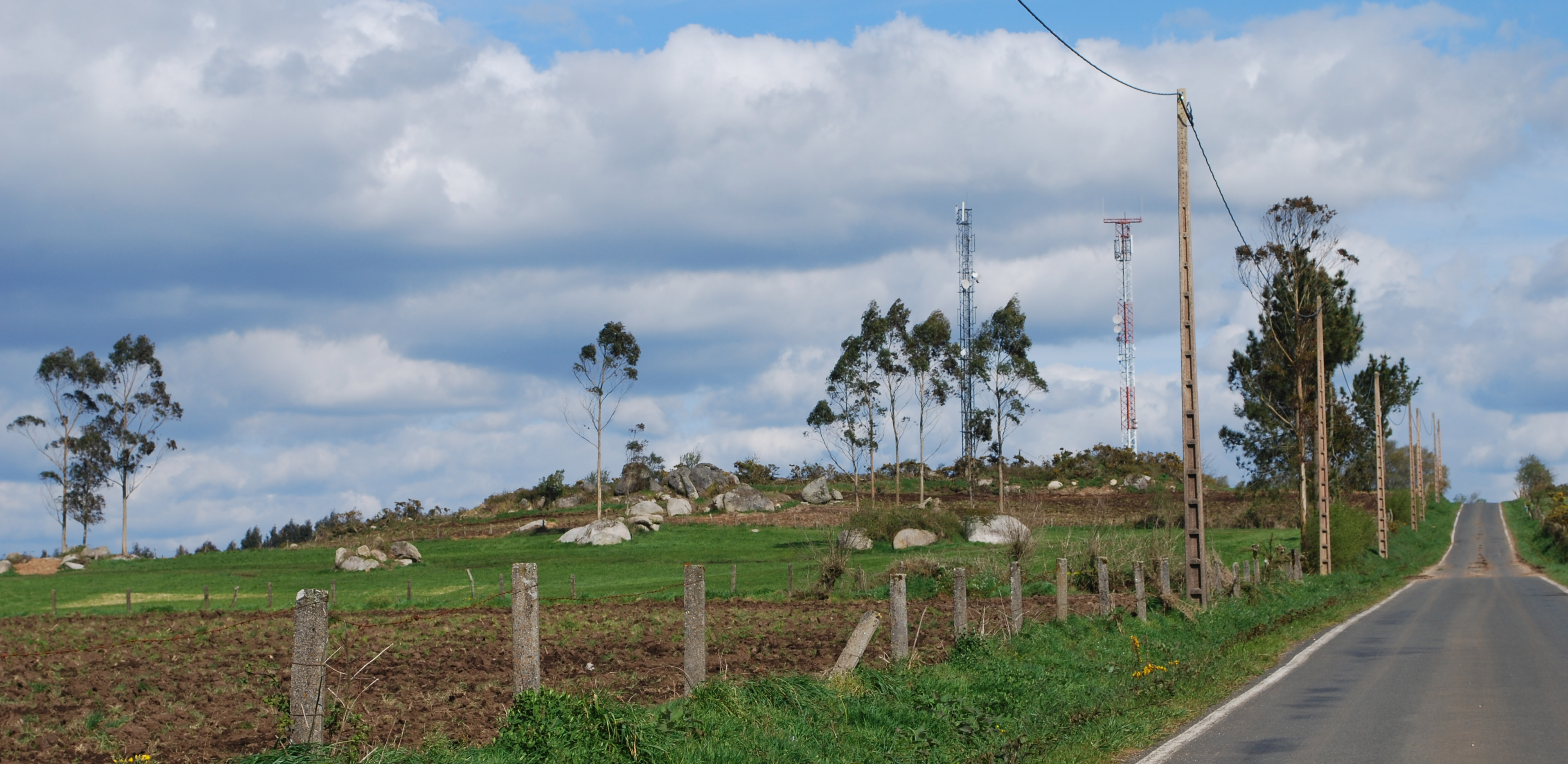 Vista do alto do monte Enxameado en Curtis A Coruña Galiza Spain